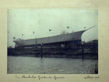 De Geertruida Gerarda op de helling bij J. & K. Smit, 1904